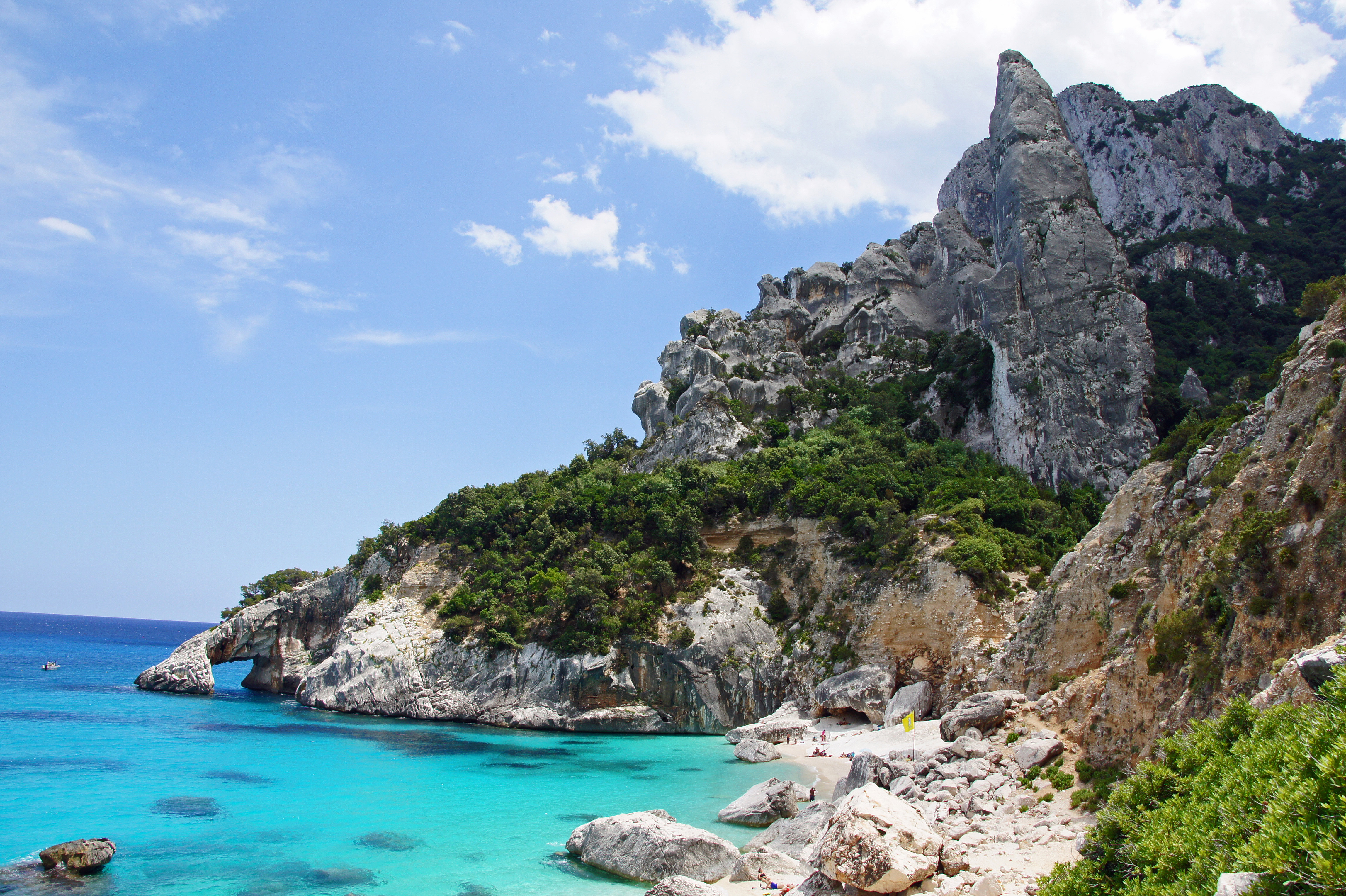 Felsenstrand Cala Goloritze bei Baunei, Sardegna